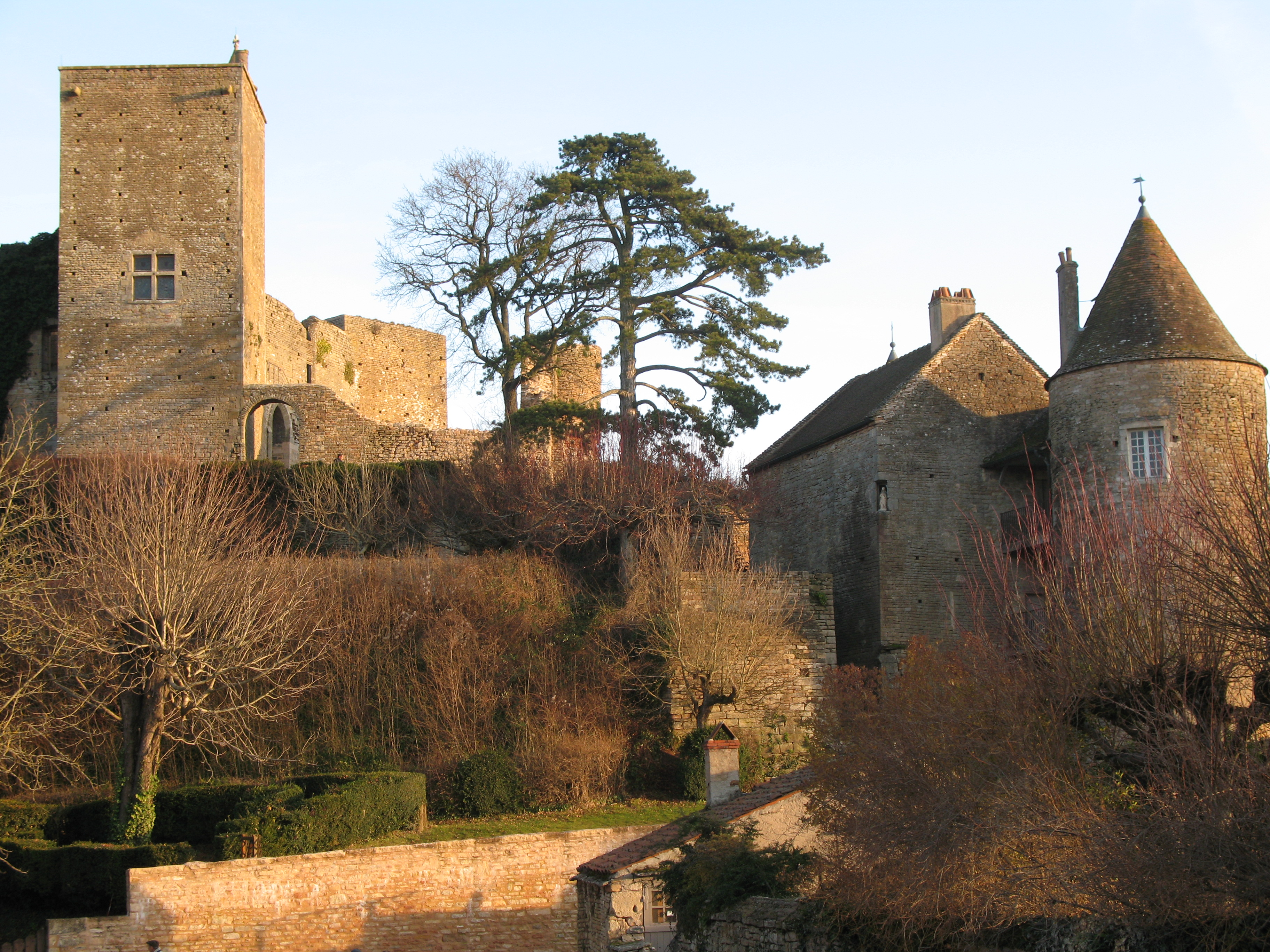 château de Brancion (Saône-et-Loire)